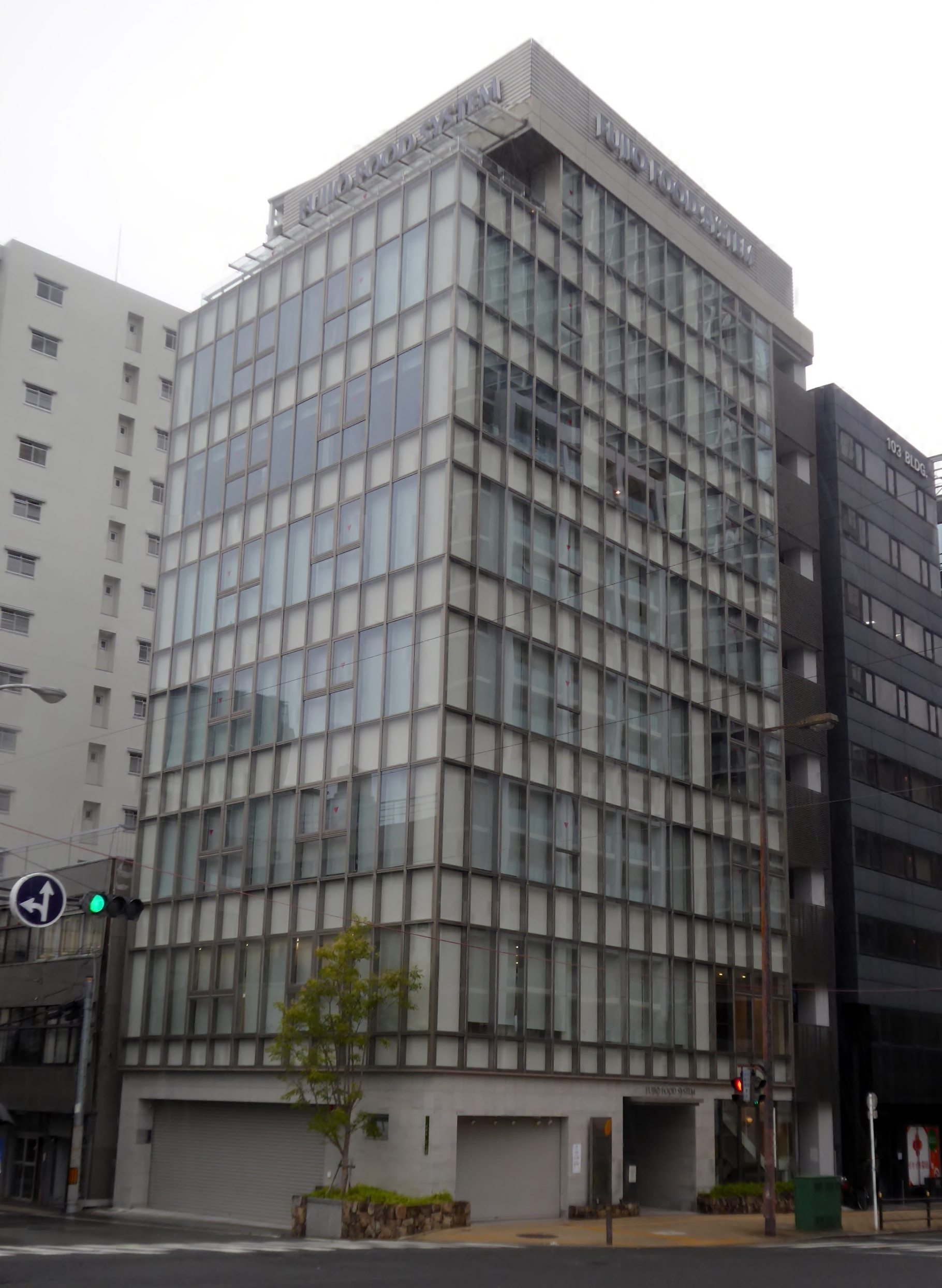 フジオビルディングを撮影。